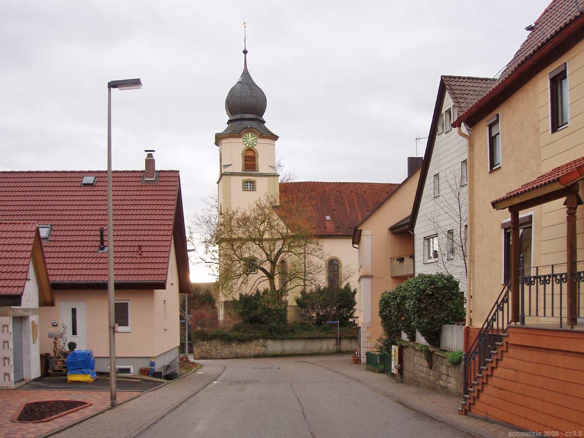 Blick von Norden entlang der Kirchhausener Straße zur Evangelischen Kirche in Bad Rappenau-Bonfeld